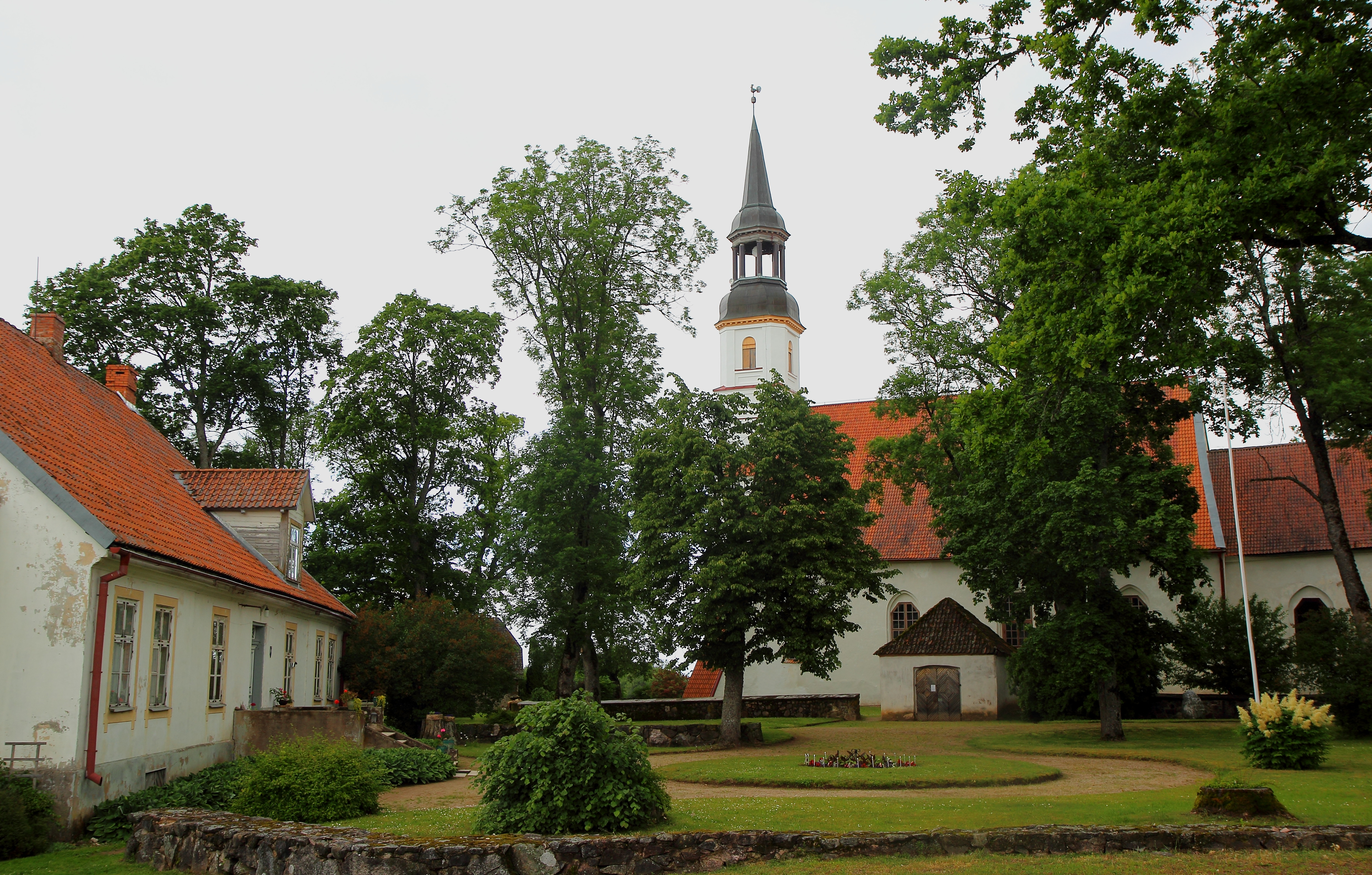 Burtnieku luterāņu baznīca, Burtnieki